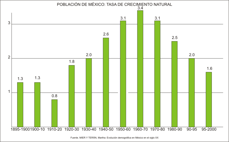 Tasa de crecimiento natural de México